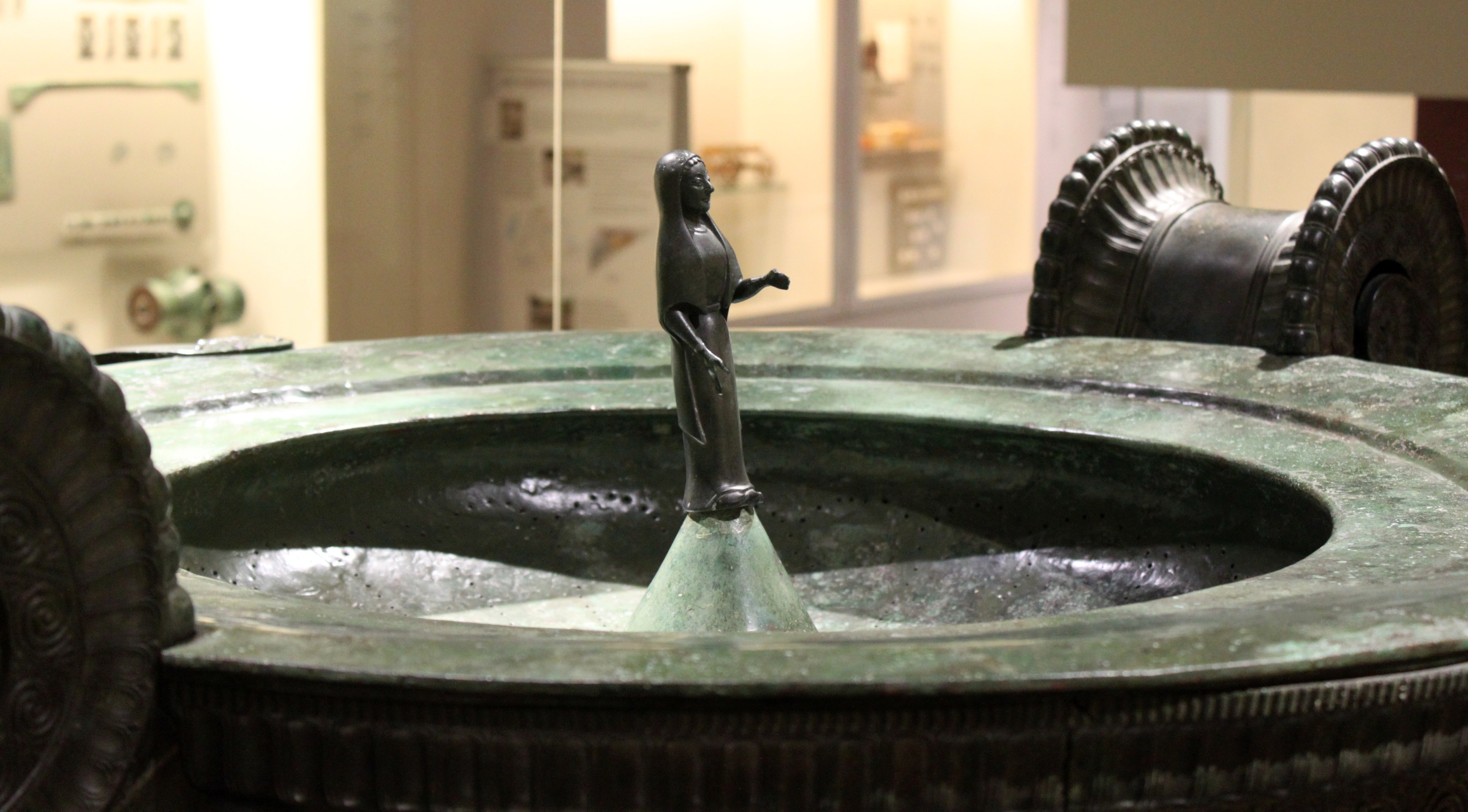 Musée du Pays Chatillonnais, Chatillon sur Seine, Côte d'Or, Bourgogne